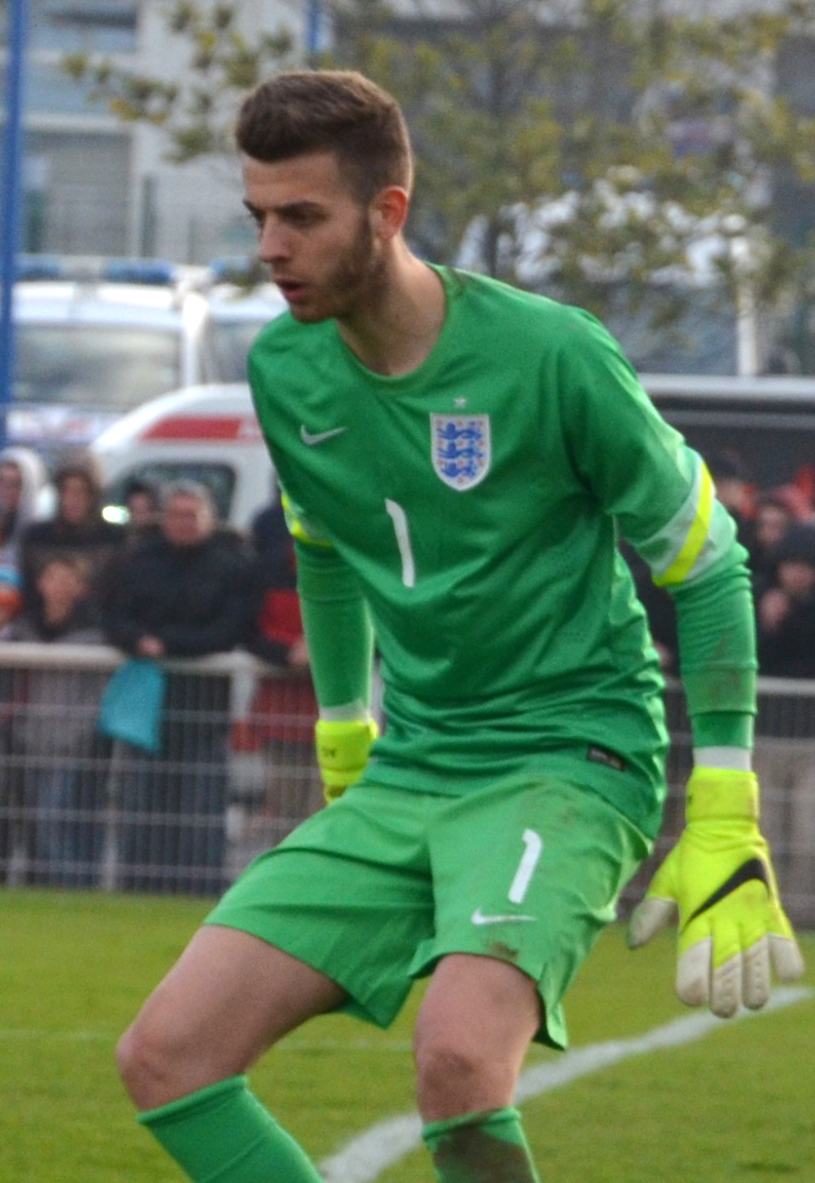 Photographie prise lors du match opposant la France à l'Angleterre pour les qualifications du championnat d'Europe de football des moins de 19 ans 2015 au stade Louis-Villemer de Saint-Lô le 31 mars 2015. Ici, Angus Gunn.